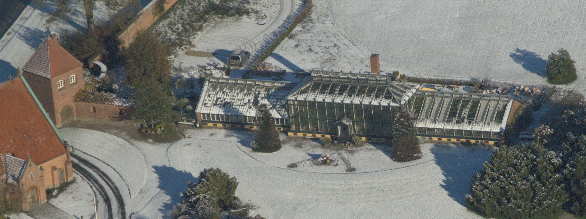 Paradehuset (Orangeri), Gisselfeld Kloster 1879